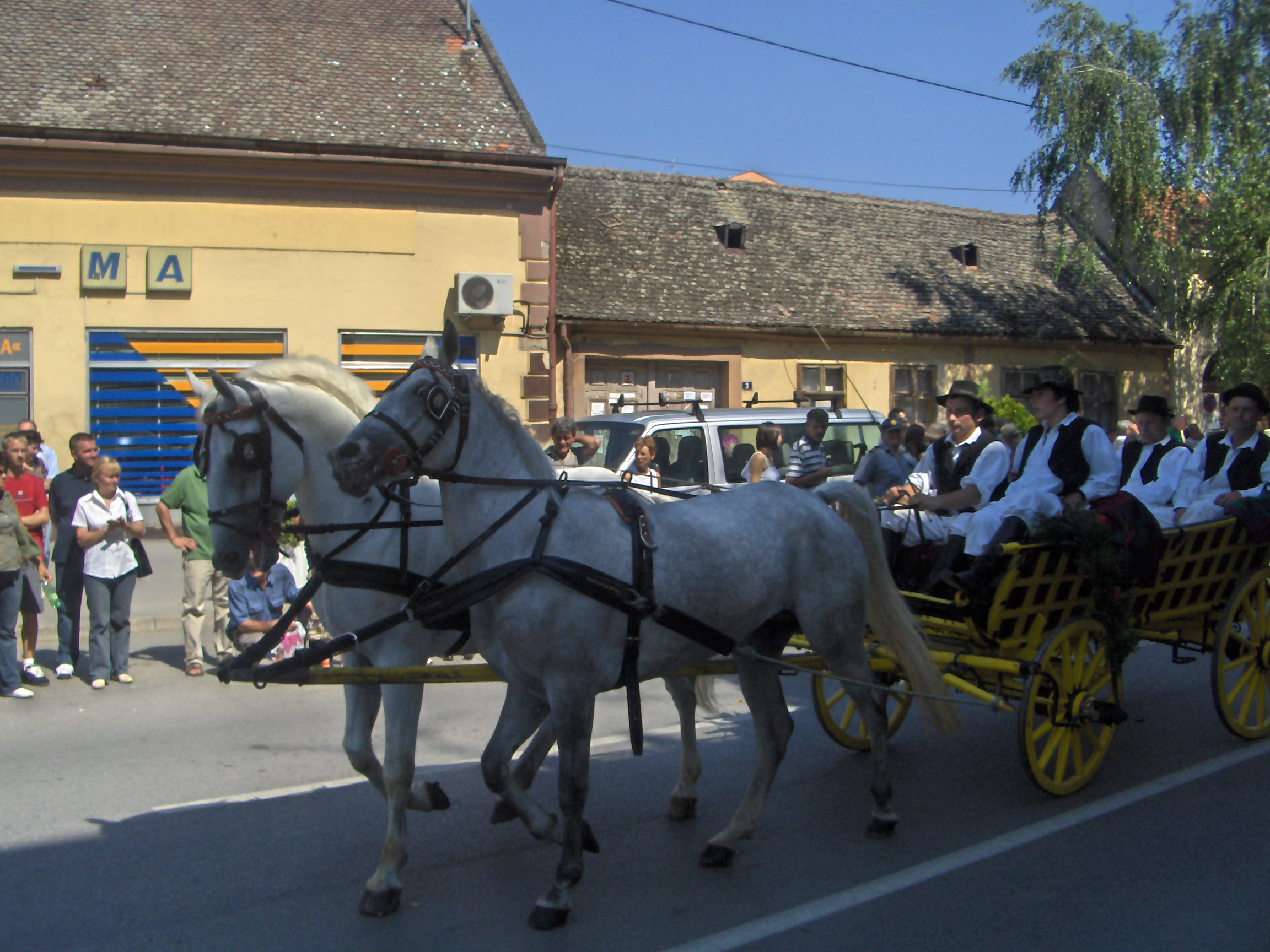 Mimhod zaprežnih kola na đakovačkim Vezovima 2007. godine